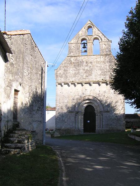 église de Massac